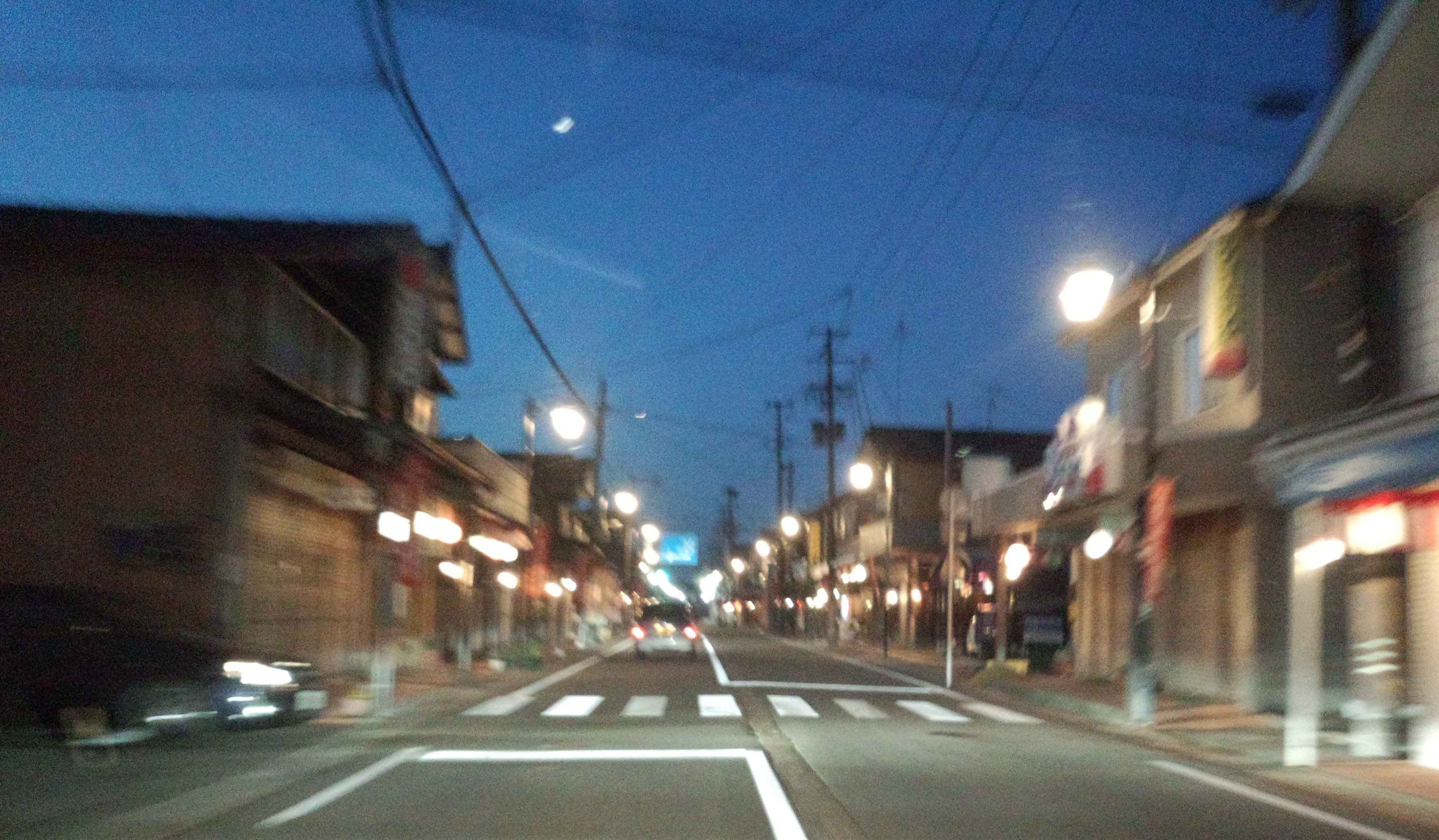 新潟県新潟市秋葉区小須戸地区の街並み